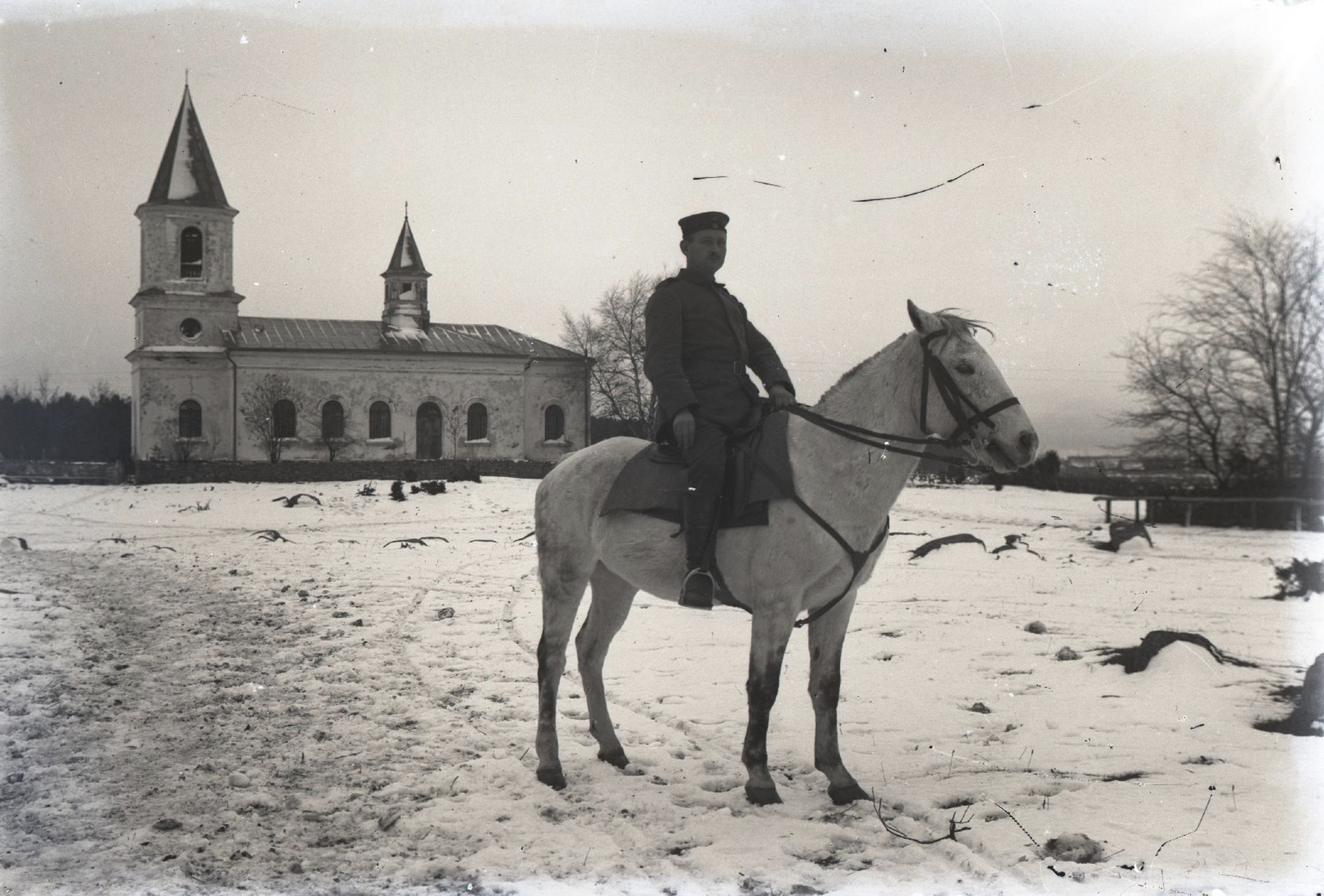 Saksa sõdur Hellamaa kiriku juures